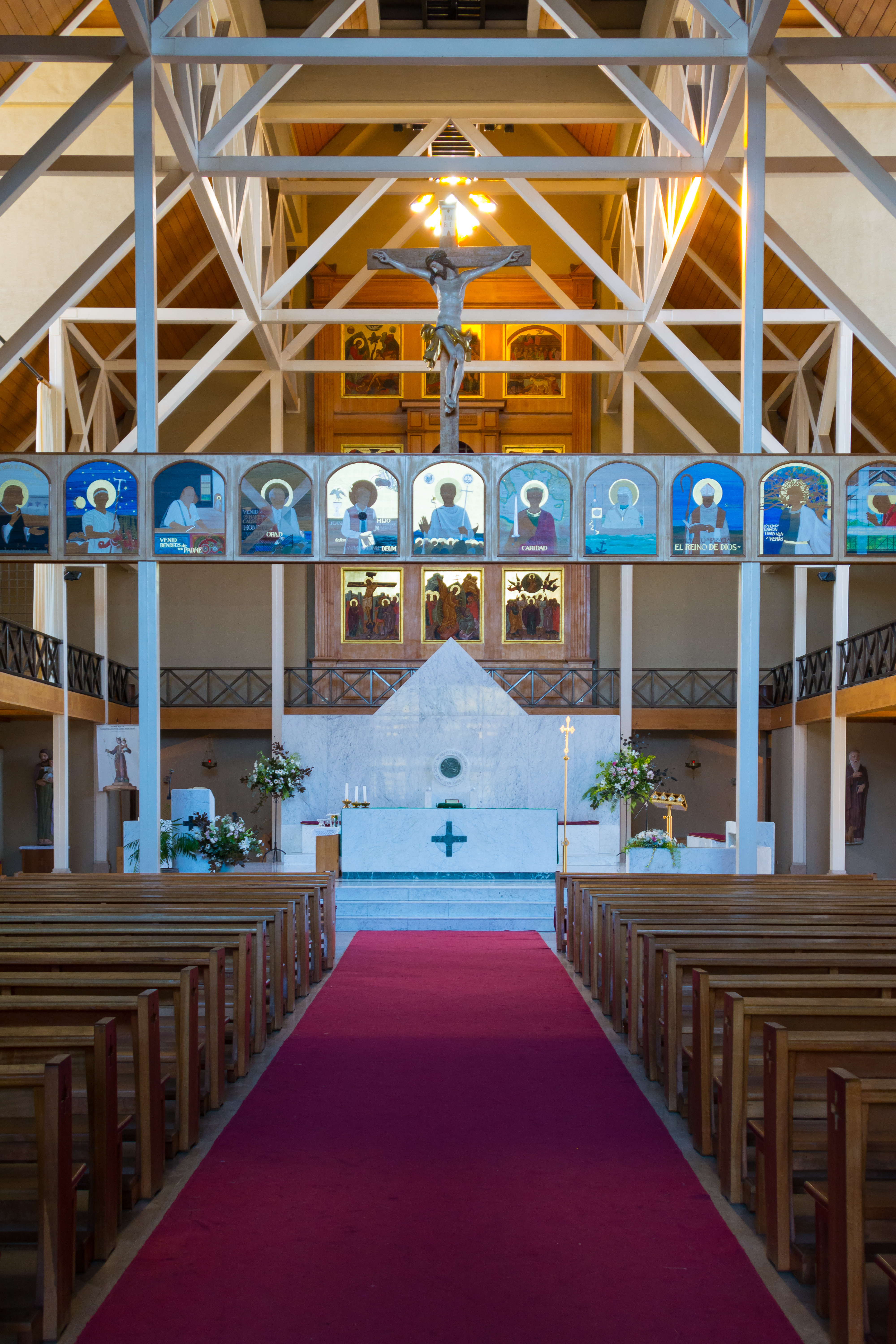 Interior de Catedral de Valdivia, Valdivia, Región de Los Ríos, Chile.